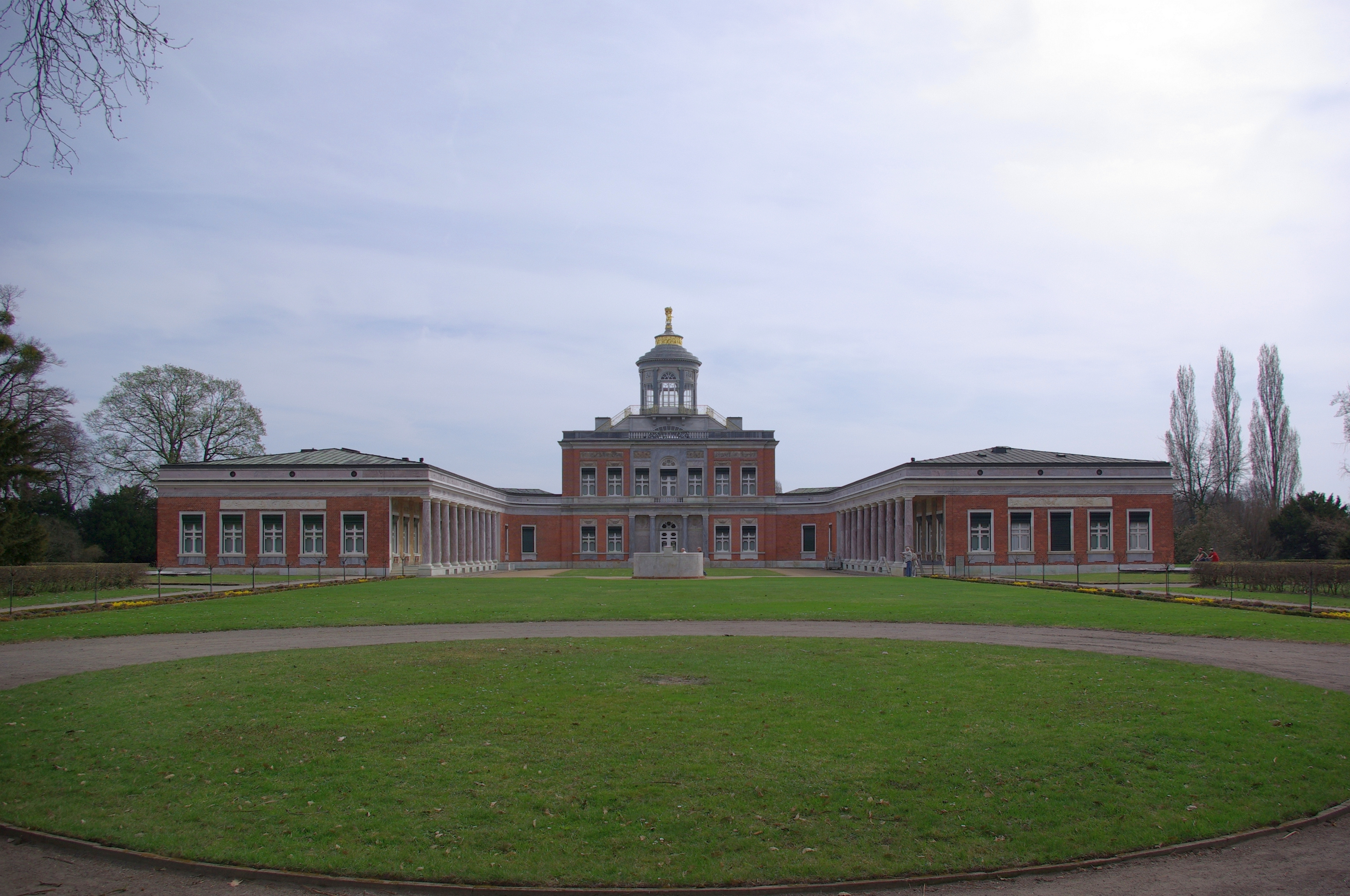 Potsdam in Brandenburg. Das Marmorpalais im Neuen Garten.